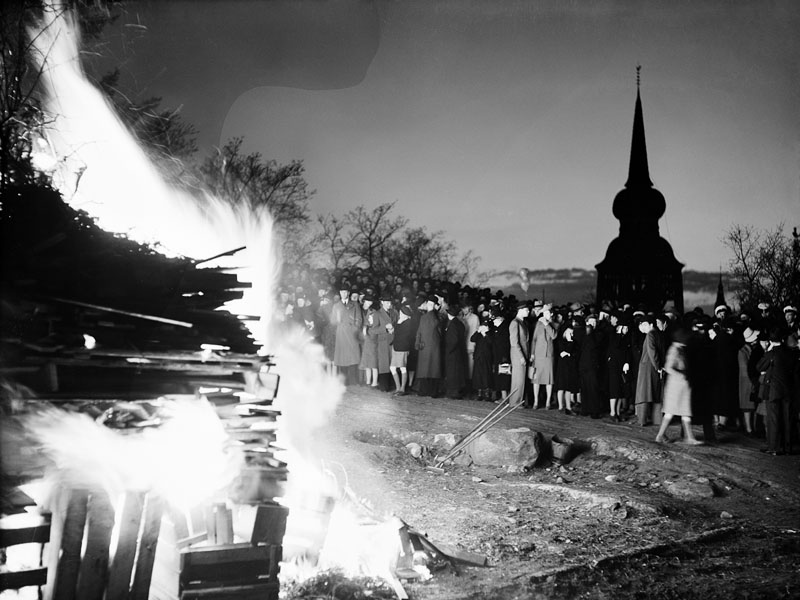 Skansen. Valborgsmässoafton firas med brasa.